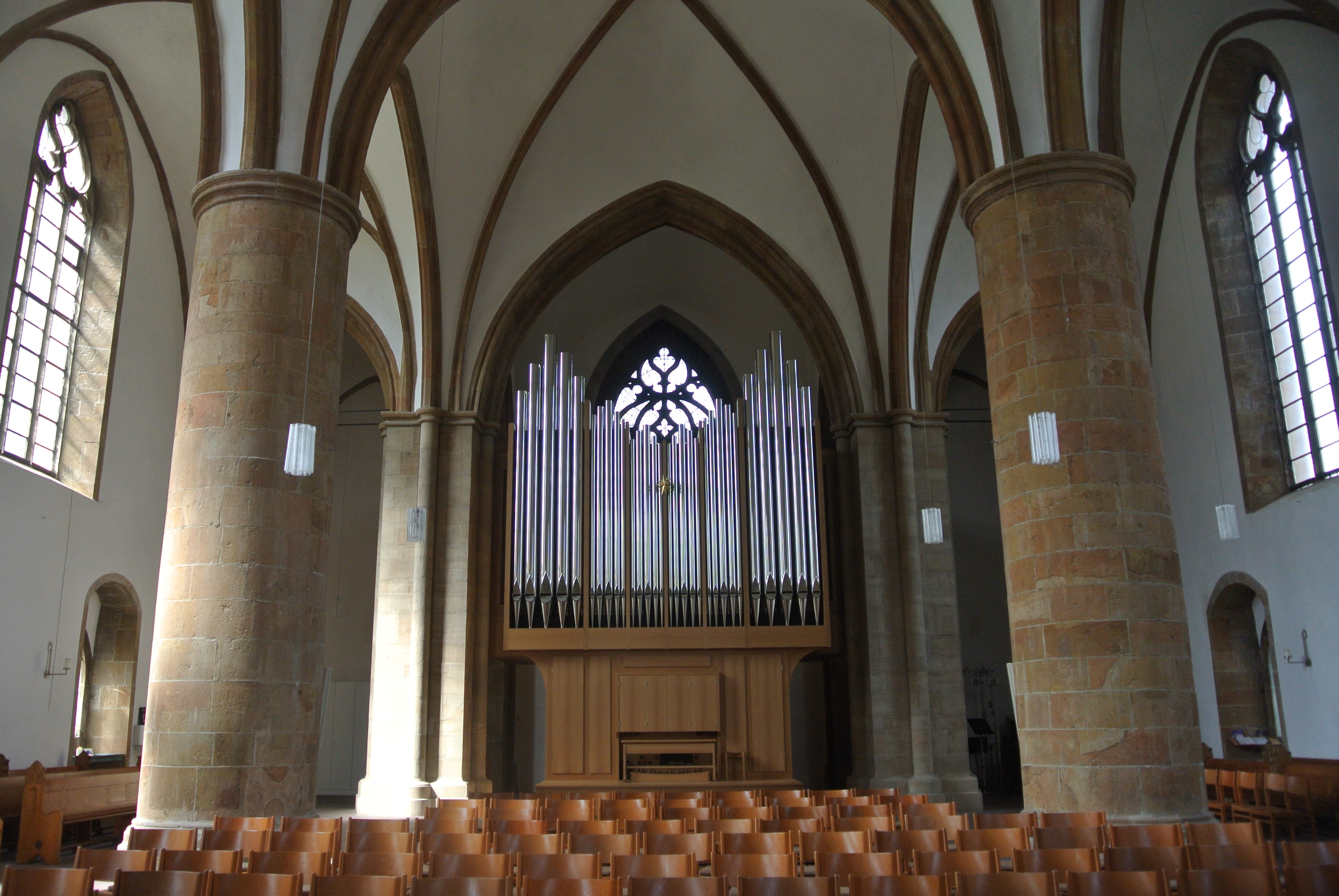 Marienkirche Bielefeld Orgel